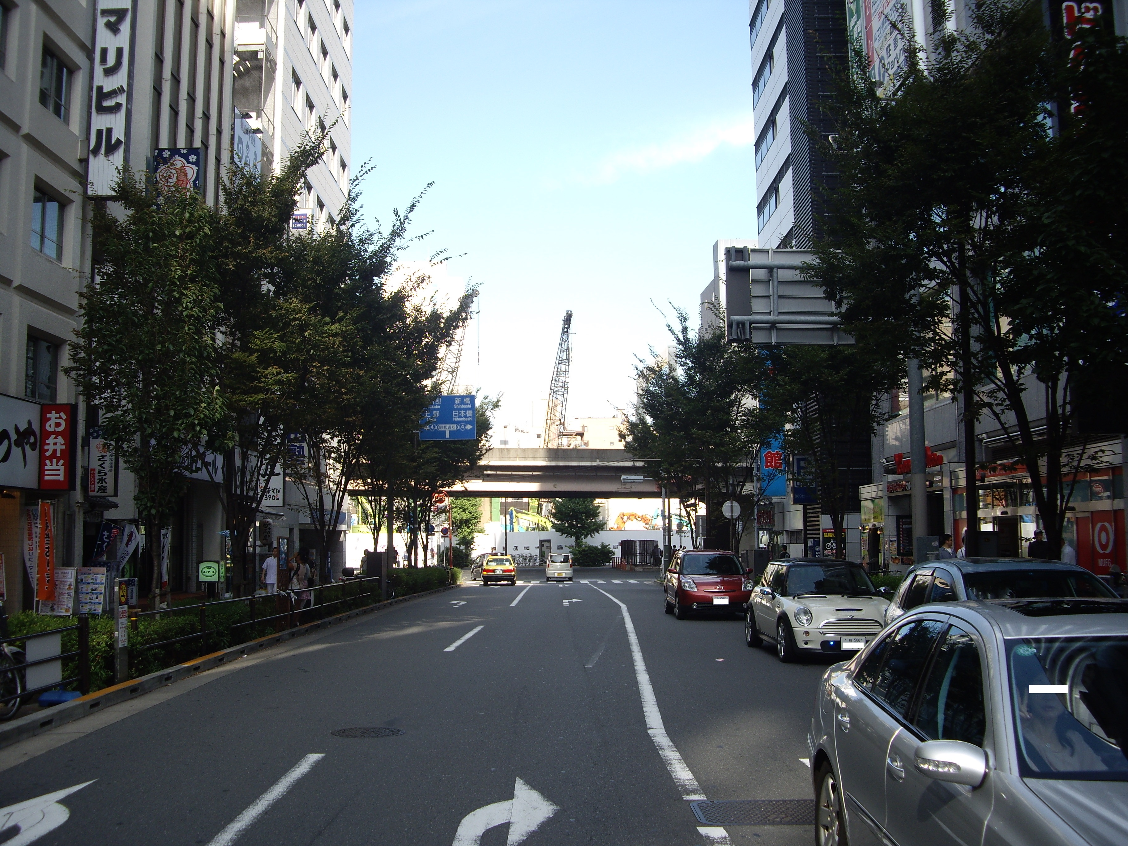 神田松永町(1)